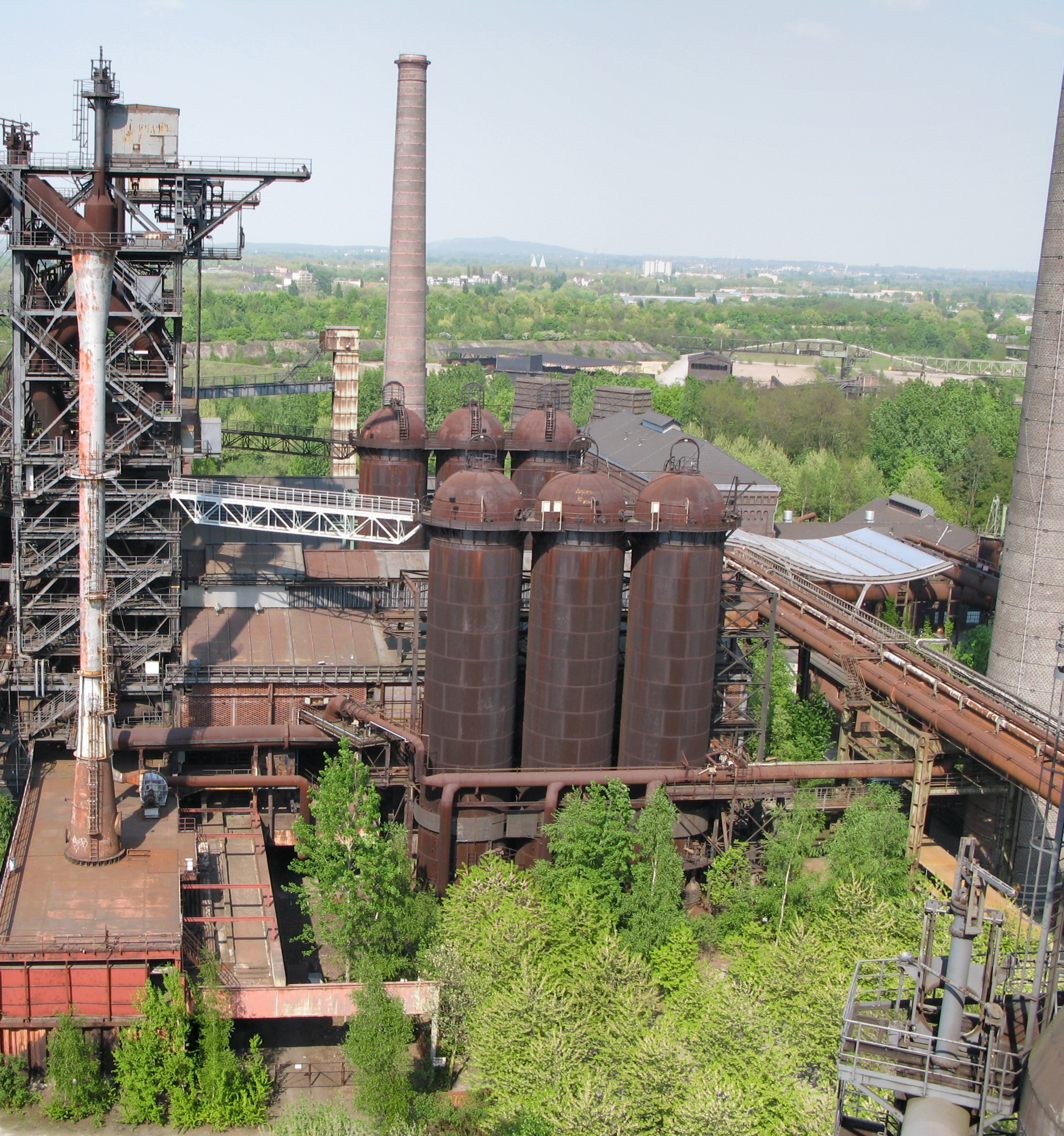 Landschaftspark Duisburg-Nord - Seitenansicht des Hochofen 2, rechte Seite mit Winderhitzer, vom Hochofen 5 aus gesehen